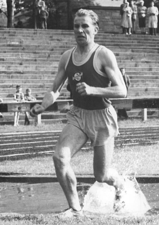 Janke Zentralbild Wlocka 22.7.1956 VII. DDR-Leichtathletik-Meisterschaften in Erfurt In der Zeit vom 20. bis zum 22. Juli 1956 werden in Erfurt die VII. Leichtathletik-Meisterschaften der DDR ausgetragen. UBz: Im 3000-m-Hindernislauf siegte erwartungsgemäß der Berliner Vorwärts-Sportler Janke. Der Sieger kurz nach dem Passieren des Wassergrabens.